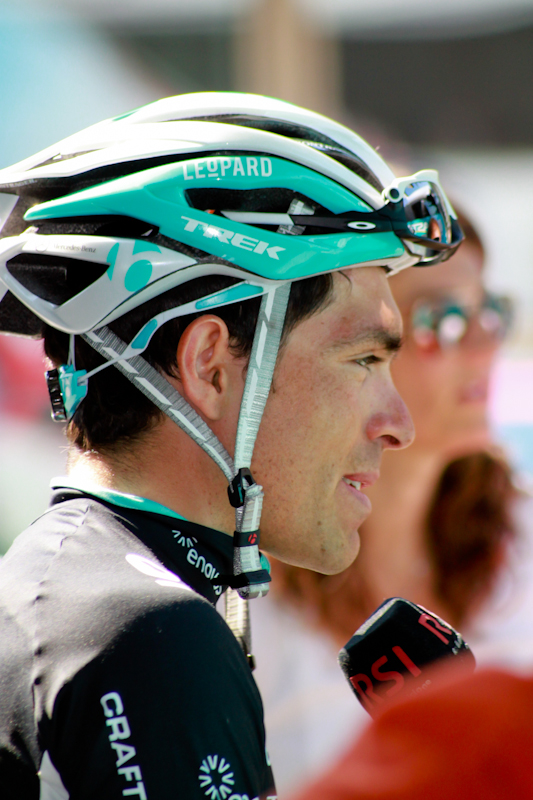 Oliver Zaugg